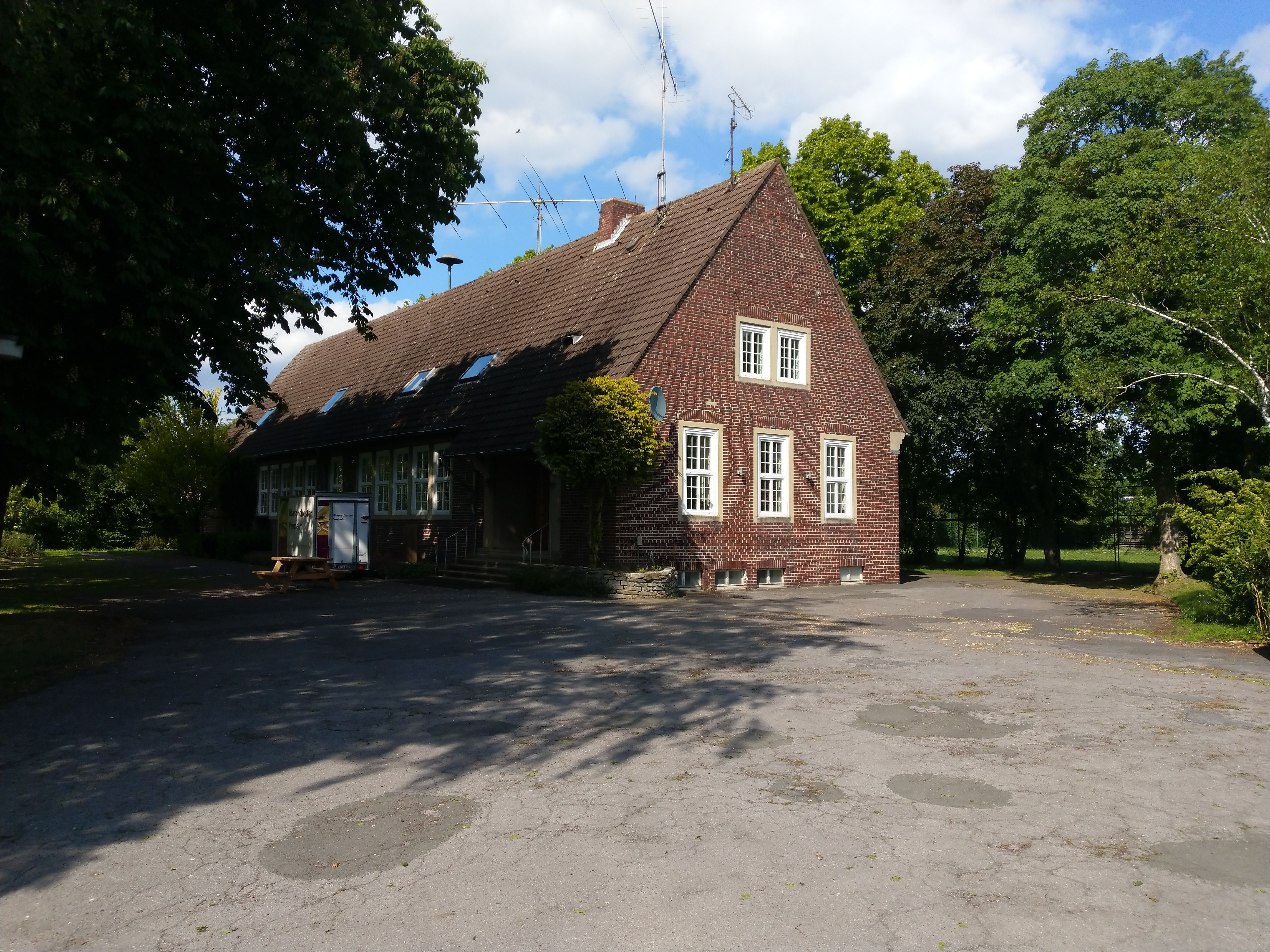 Ein Foto der Alten Schule